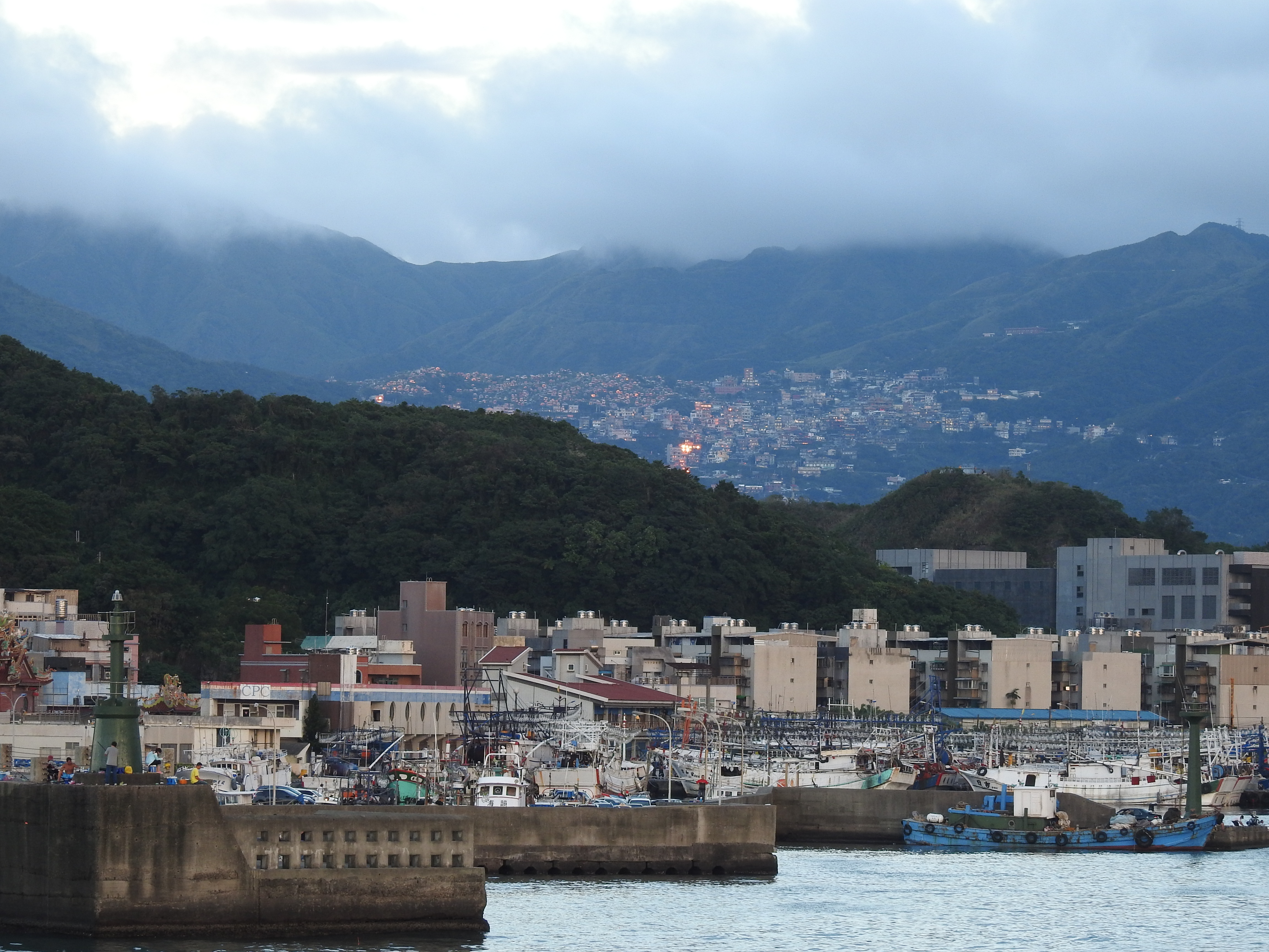 拍攝於碧砂漁港紅燈